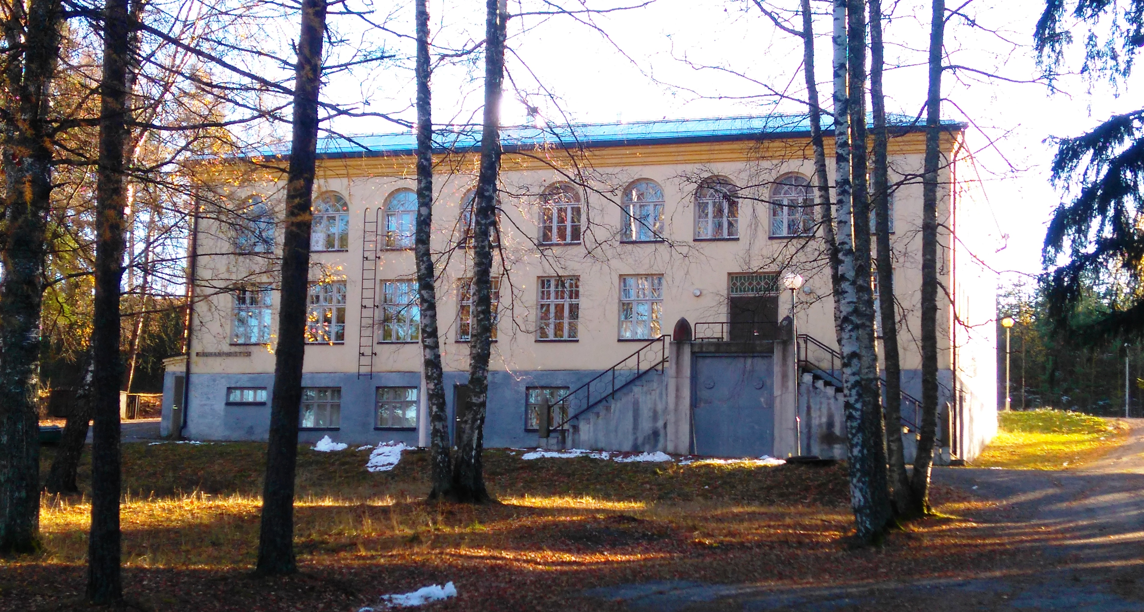 Lohjan suojeluskuntatalo, nykyisin Lohjan Rauhanyhdistyksen (lestadiolaisuus) omistuksessa. Nummentie 47, Lohja